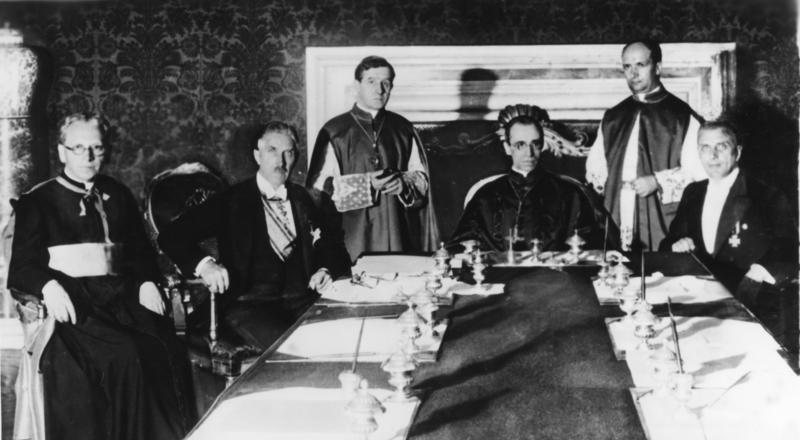 Konkordatsunterzeichnung in Rom. - Am 20. Juli 1933 wurde zwischen dem Deutschen Reich und dem Heiligen Stuhl in Rom das Reichskonkordat unterzeichnet, durch das zum erstenmal in der Geschichte für das ganze deutsche Reich die Beziehungen der katholischen Kirche zum Staat geregelt werden. Die Unterzeichnung vollzog für Deutschland der Vizekanzler Franz von Papen, für den Heiligen Stuhl der Kardinal Staatssekretär Eugenio Pacelli. Von links nach rechts: Vizekanzler Franz von Papen, (2.v.l.) Kardinal Staatssekretär Eugenio Pacelli und Ministerialdirektor Dr. Buttmann während des Unterzeichnungsaktes. 25935-33